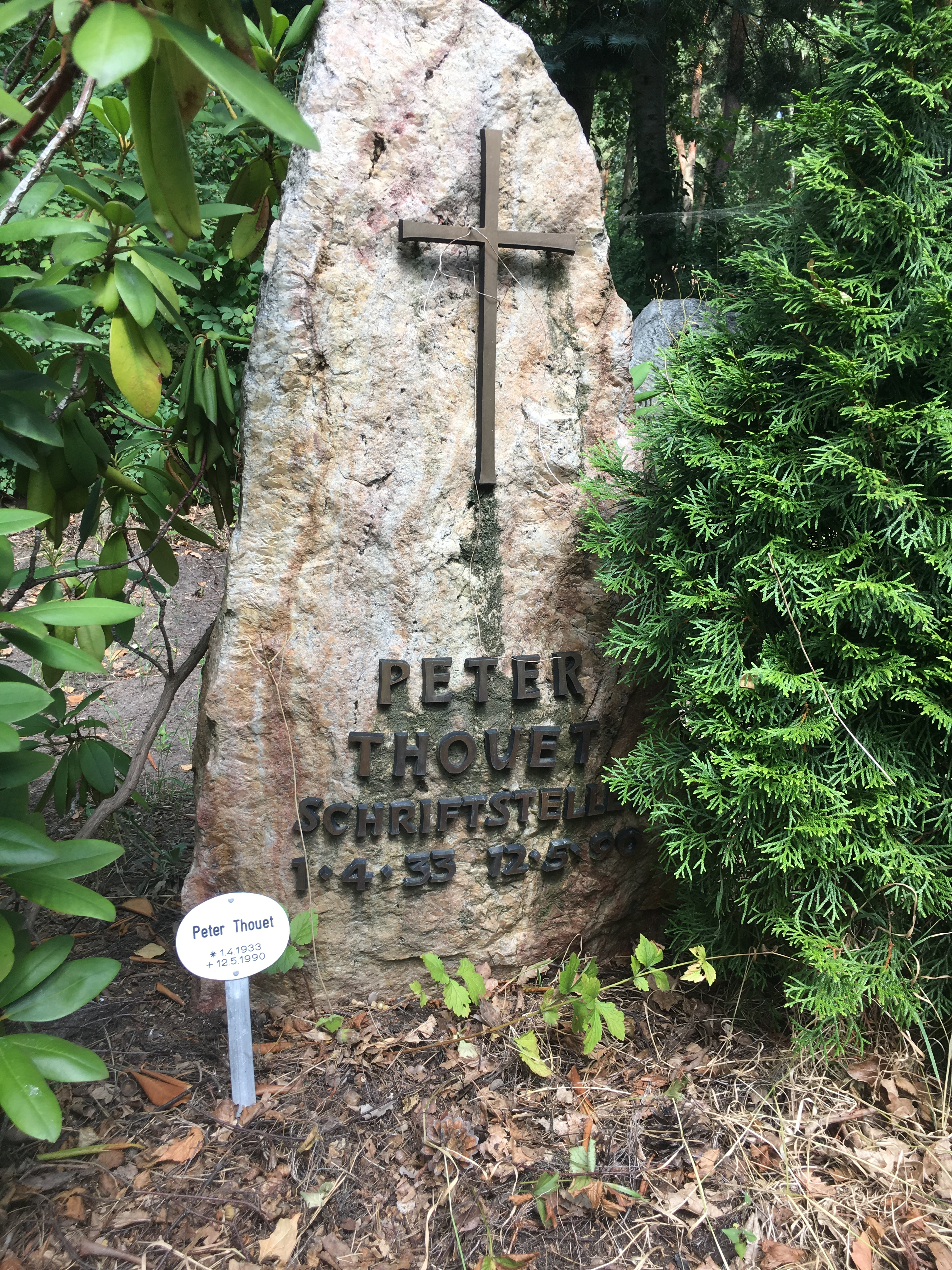 Der Grabstein von Peter Thouet